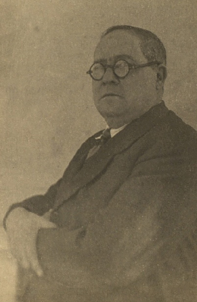 Fructuós Gelabert i Badiella